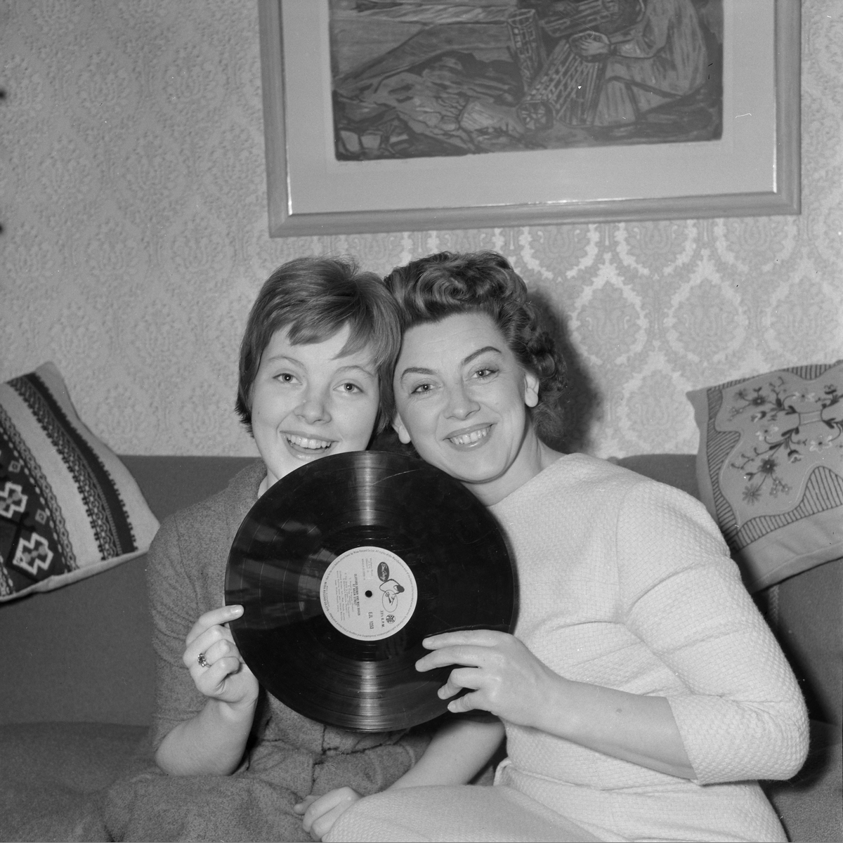 Åse Wentzel (1924-2009), var en norsk sangerinne, kjent som «Valsedronningen», og mor til jazzmusikeren Magni Wentzel.